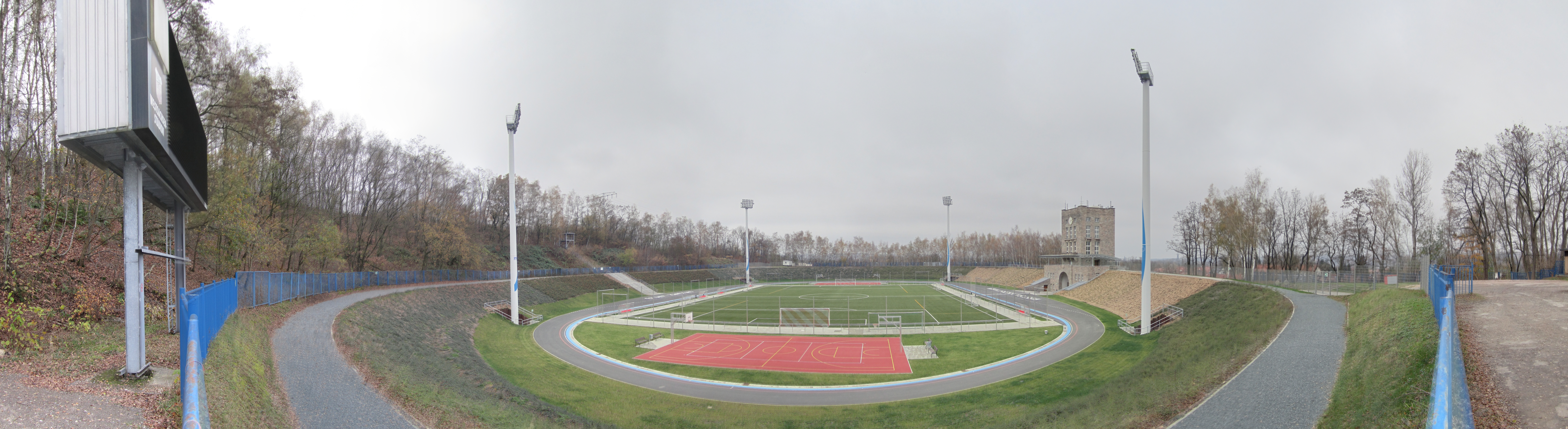 Panorama des Westsachsenstadions nach dem Umbau von 2013.